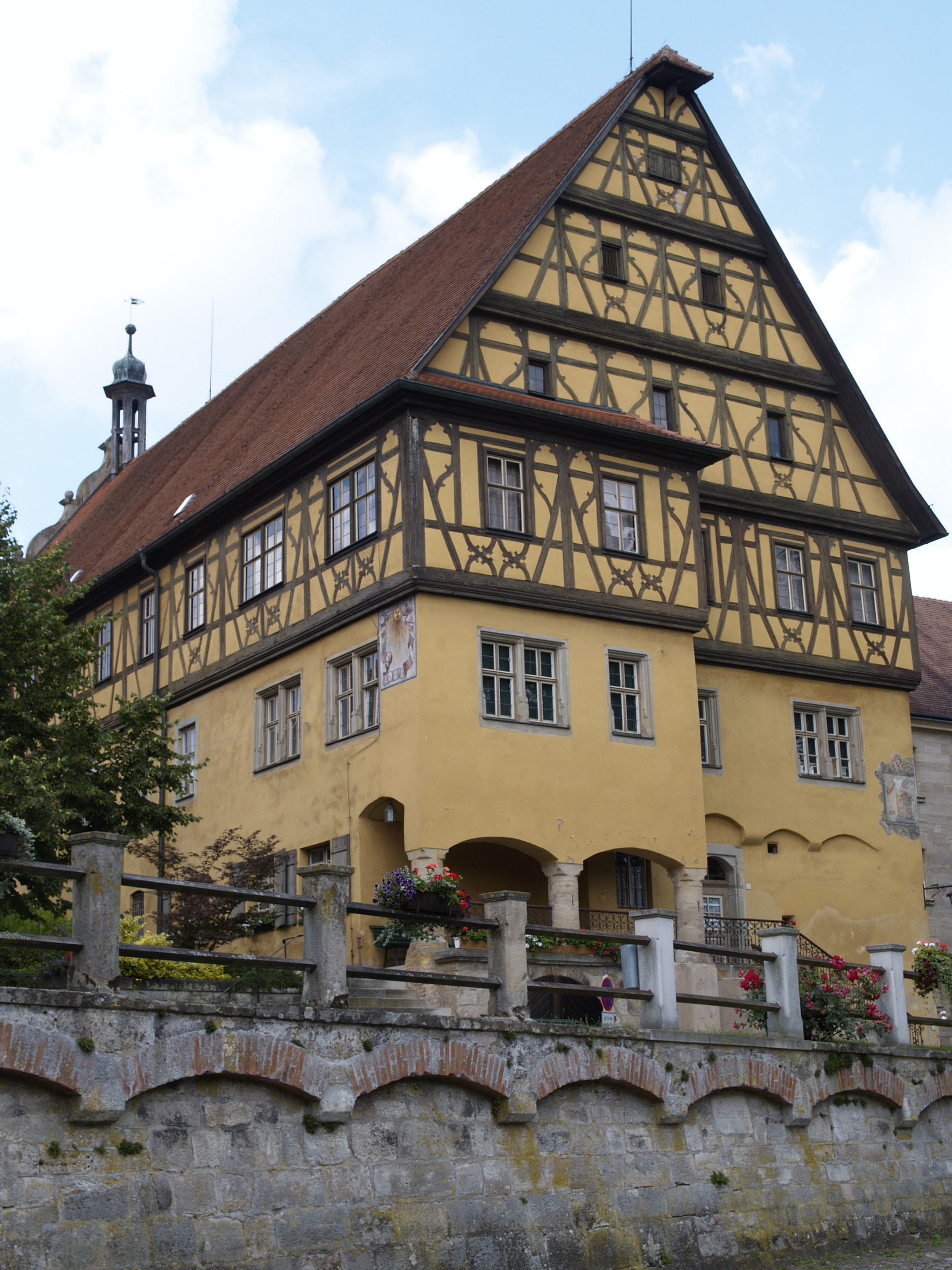 Dinkelsbühl: Im Spitalhof